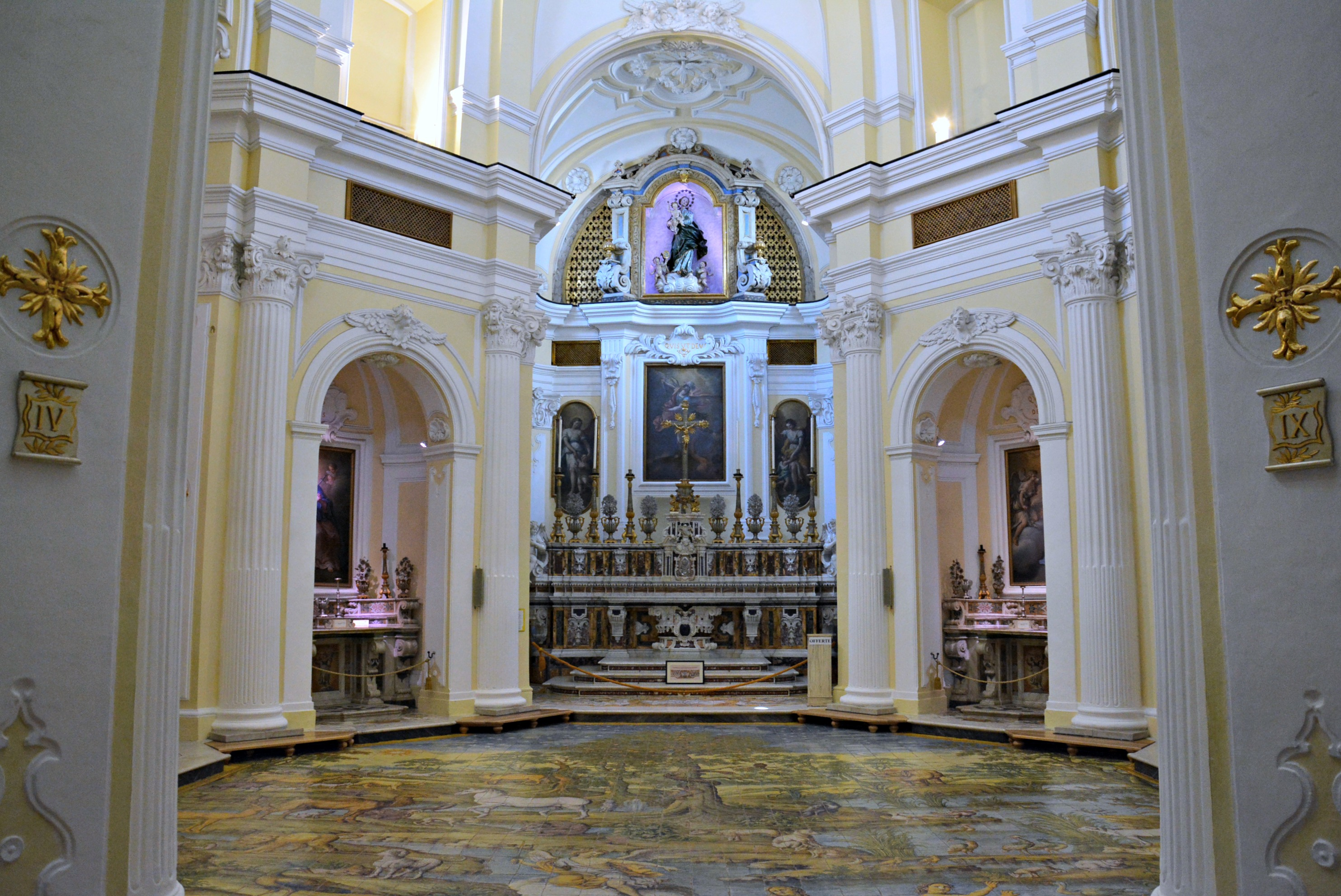 Vedi titolo